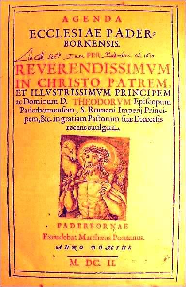 Die Titelseite der Paderborner Agende von 1602 gedruckt von Matthaeus Pontanus